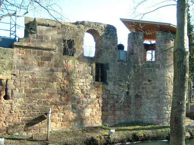 Burg in Bad Vilbel